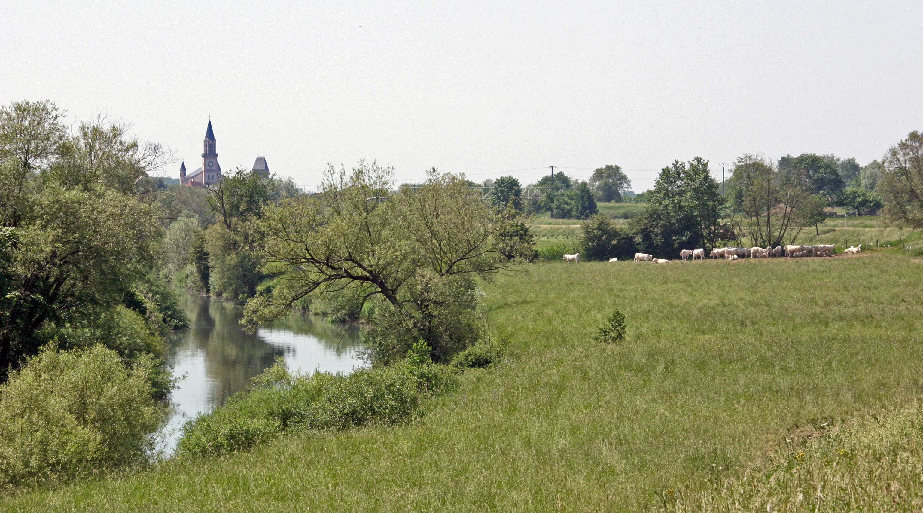 Herbitzheim